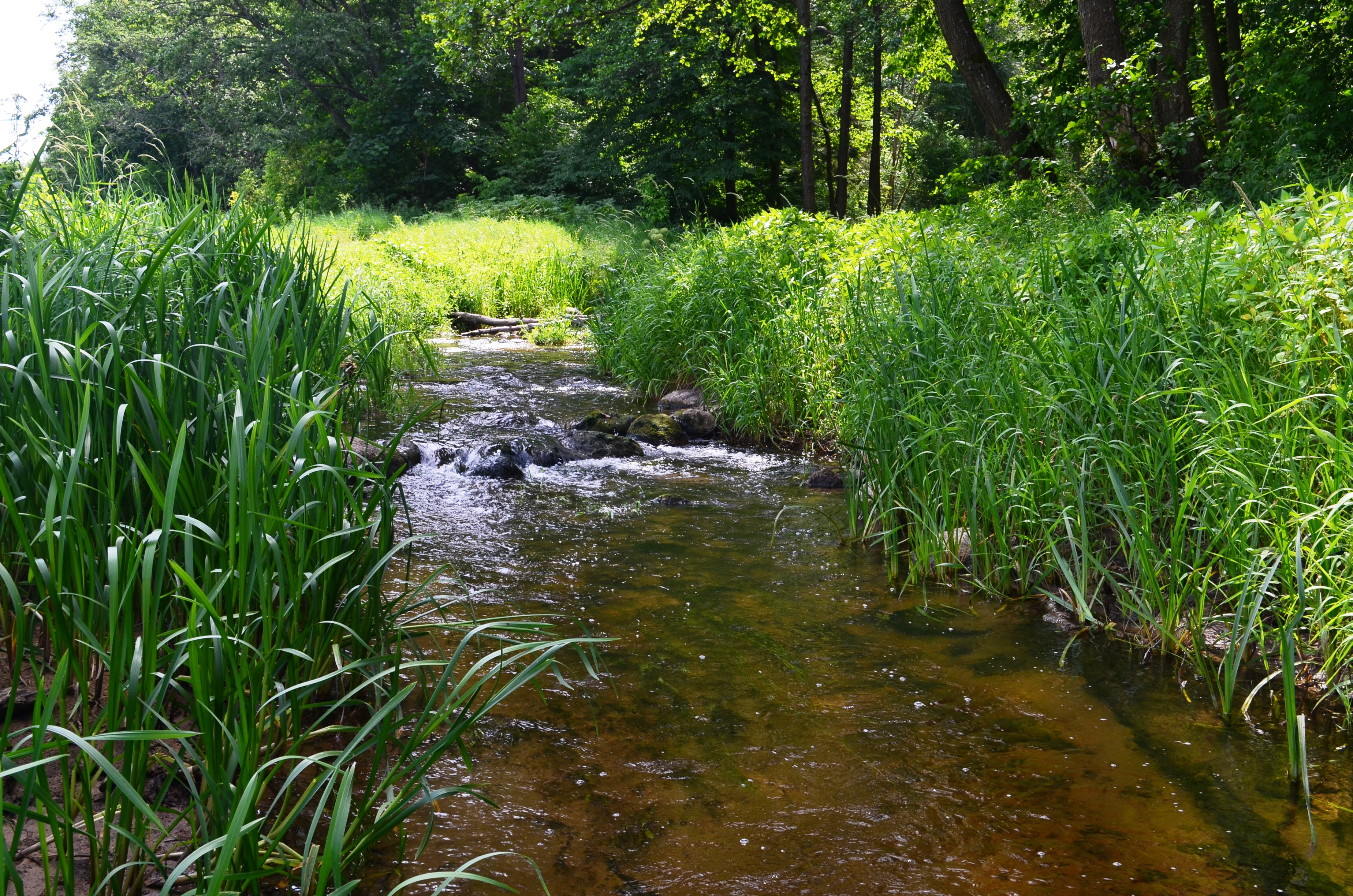 Bražuolė šalia žiočių Neryje, Elektrėnų sav.